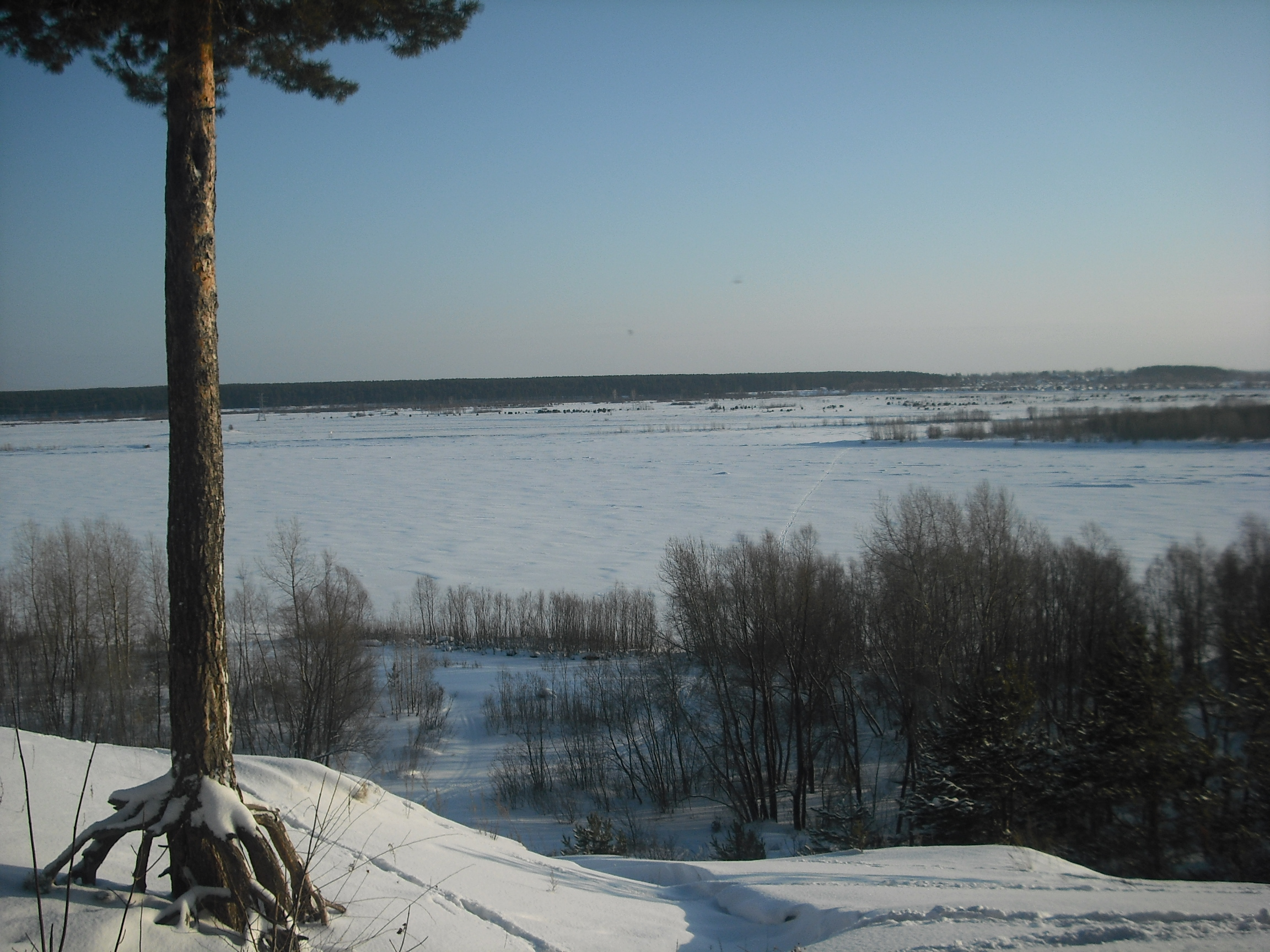 Река Бия ниже Бийска. На заднем плане — Смоленский тракт и с. Усть-Катунь